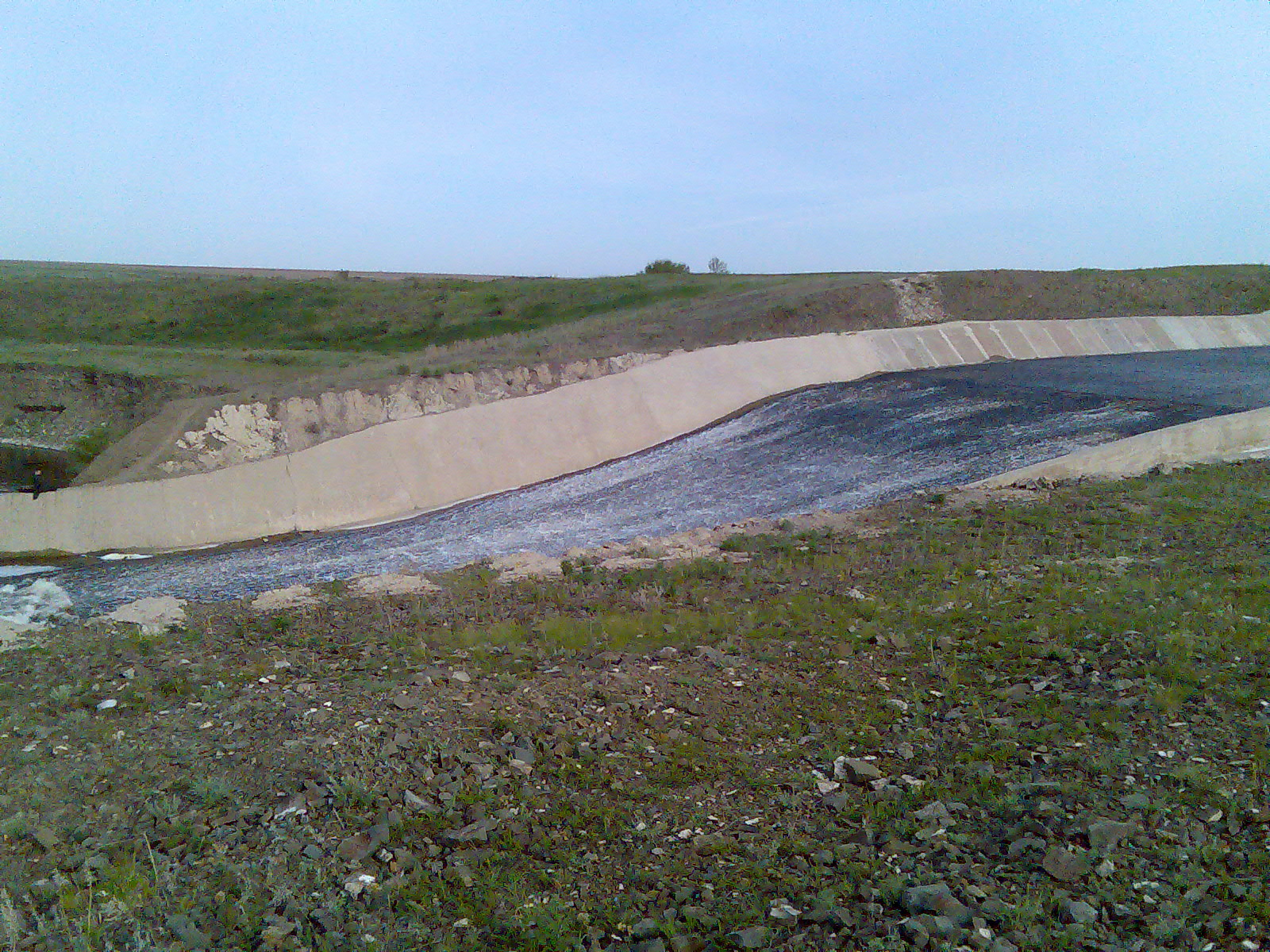 река Большая Уртазымка у села Целинное (Хайбуллинский район)